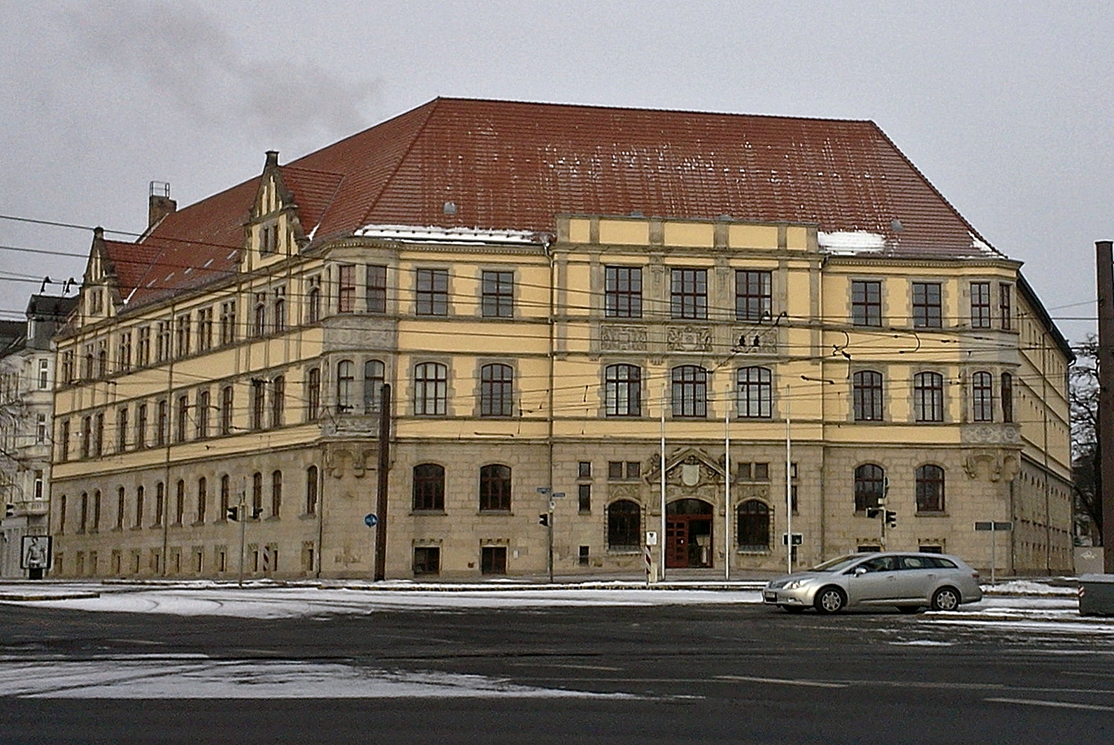 Nebenstelle des Landesverwaltungsamtes Magdeburg